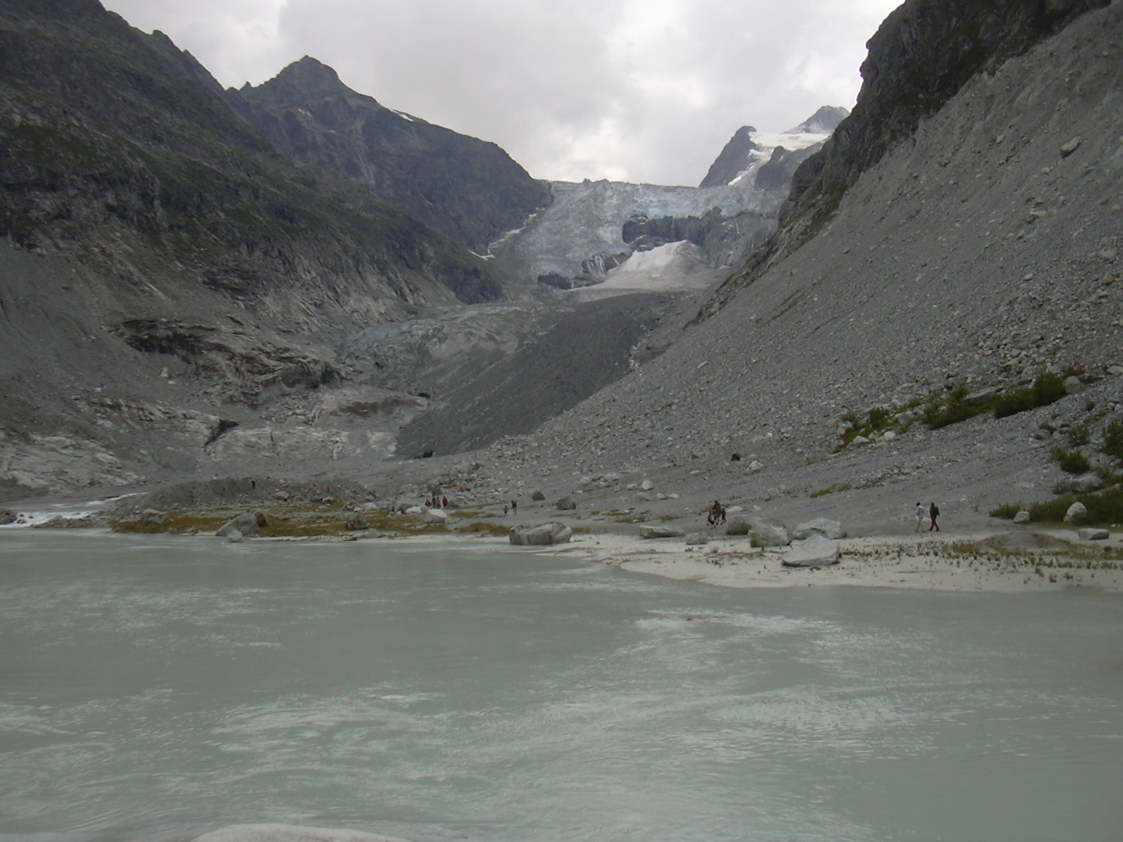 Glacier du Mont Miné, Valley of the Borgne de Ferpècle, Valais, Switzerland